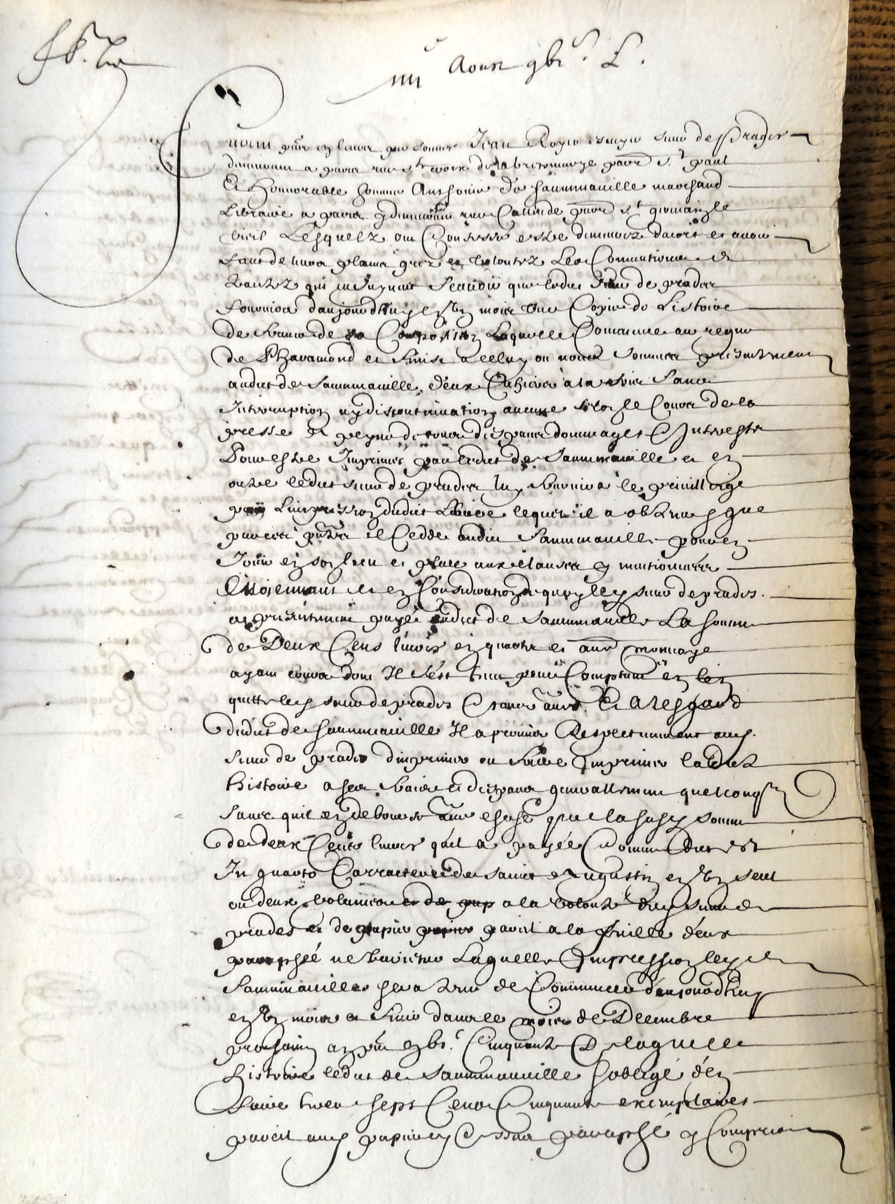 Premièère page du contrat d'impression de l'Histoire de France